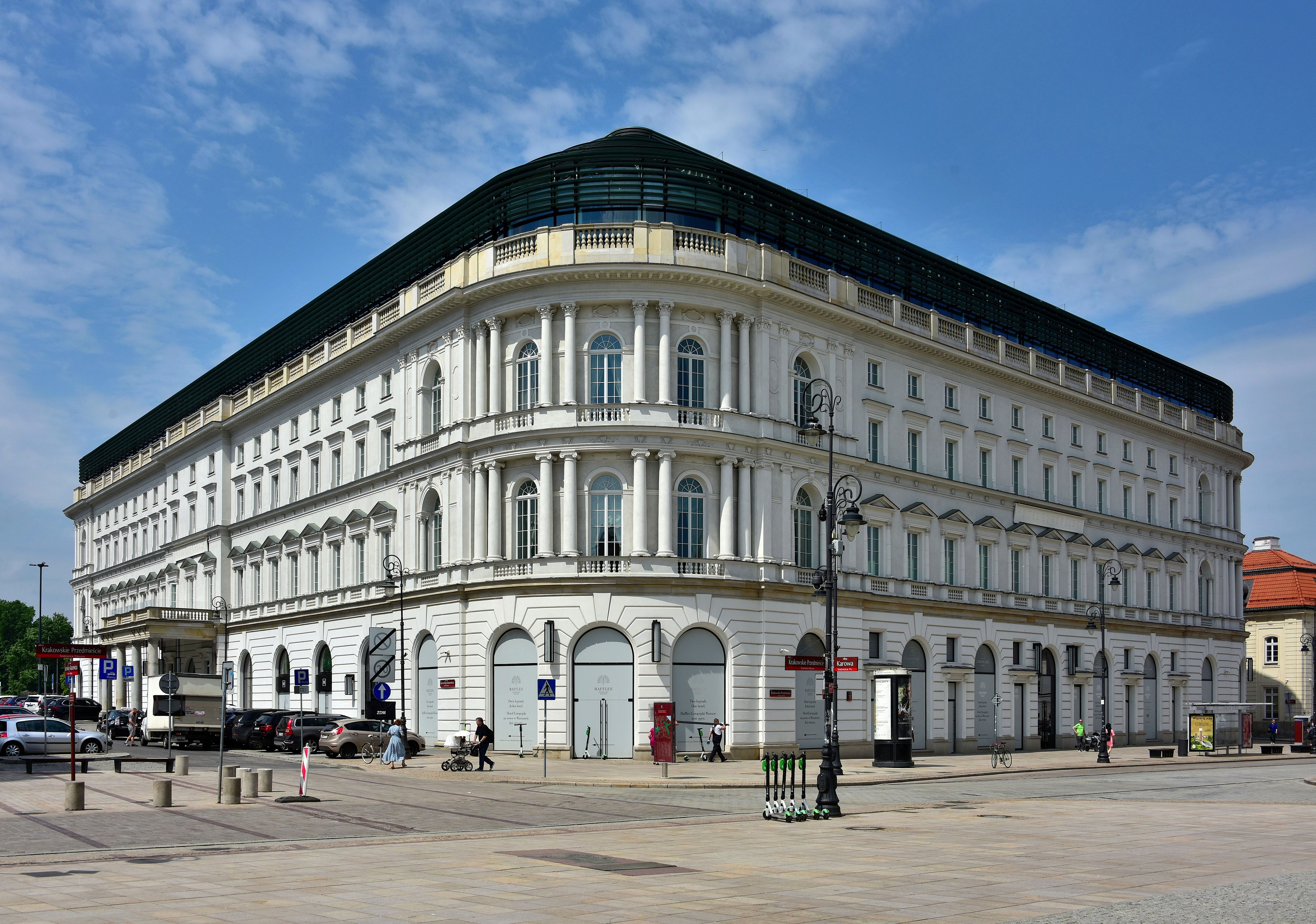 Budynek Hotelu Europejskiego w Warszawie